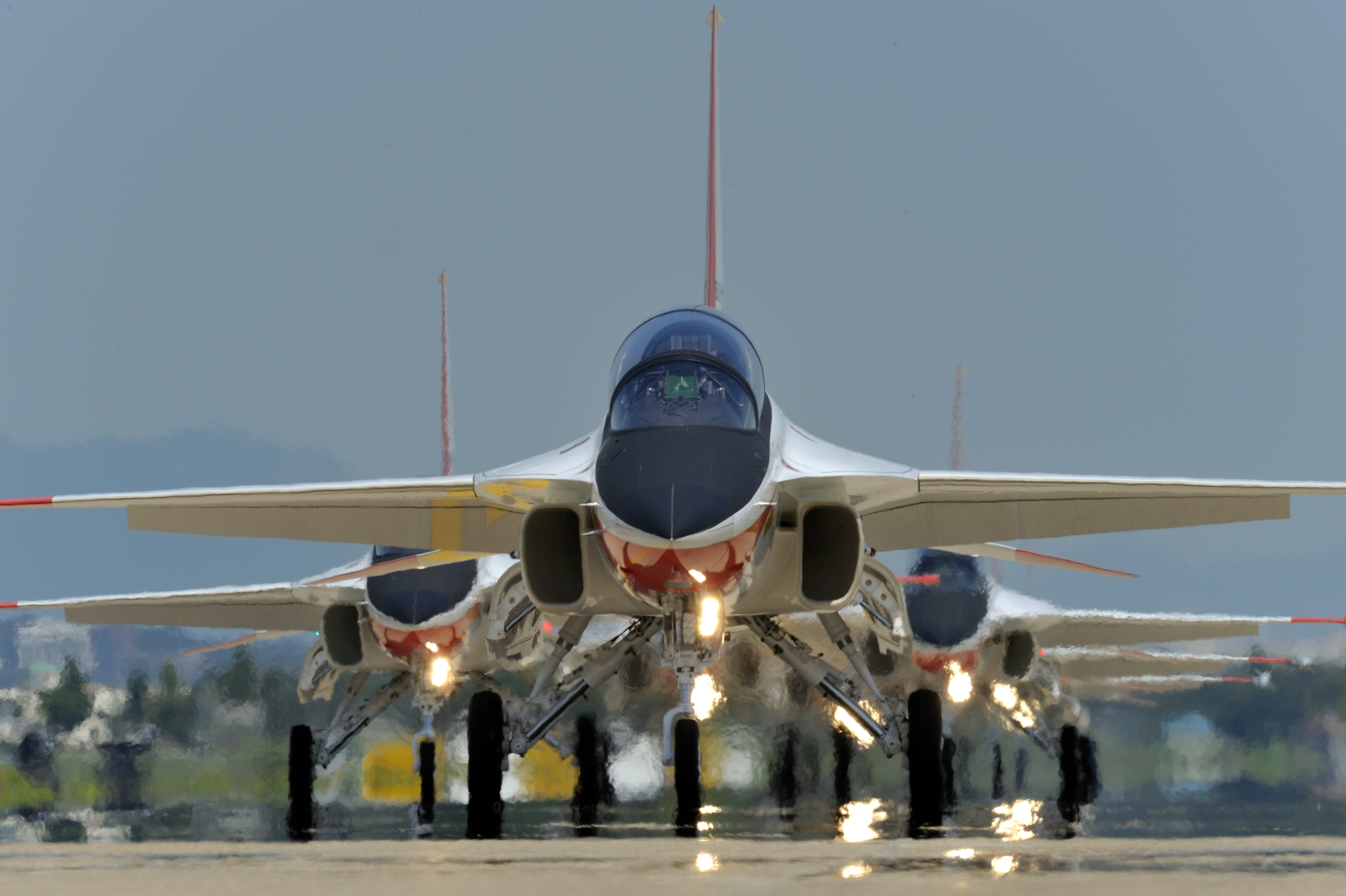 T-50 골든 이글